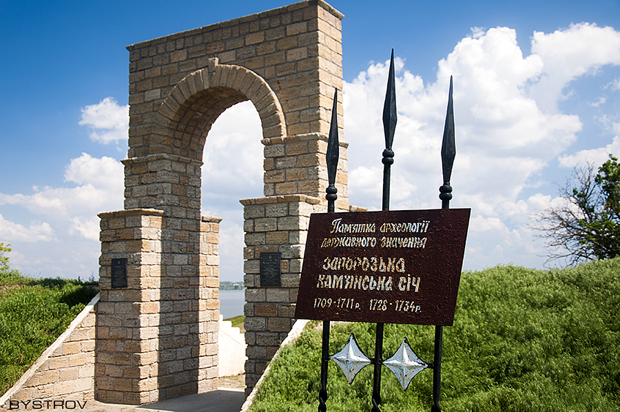 Каменская Сечь